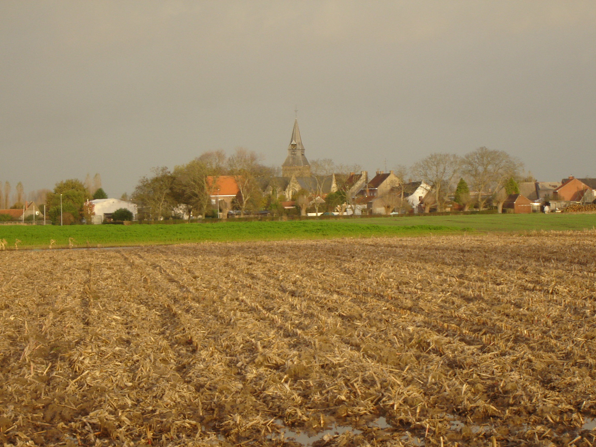 Sint-Martinuskerk en dorpscentrum van Haringe, Poperinge. Saint Martinus Church and village centre of Haringe in Roesbrugge-Haringe, Poperinge, West-Flanders, Belgium